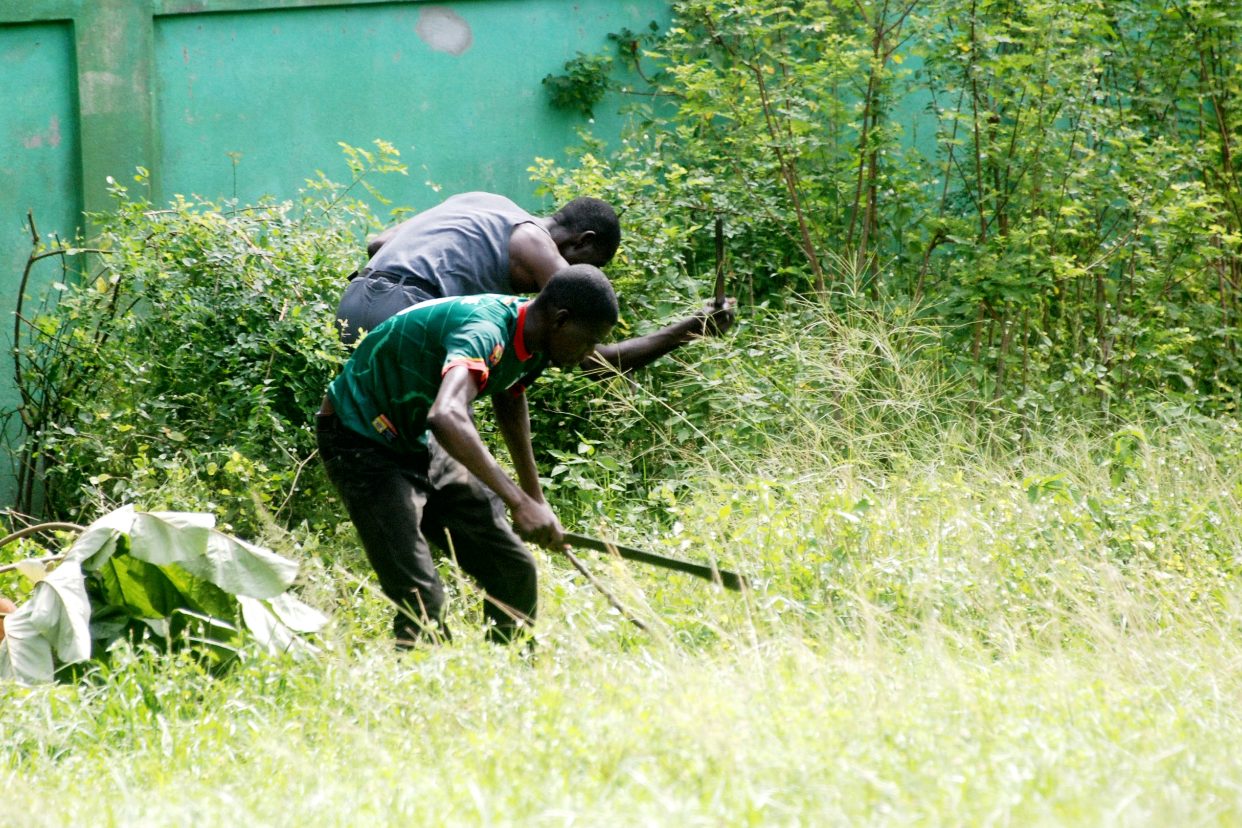 hommes débroussailleurs dans la ville d'Abidjan This is an image of "African people at work" from Ivory Coast